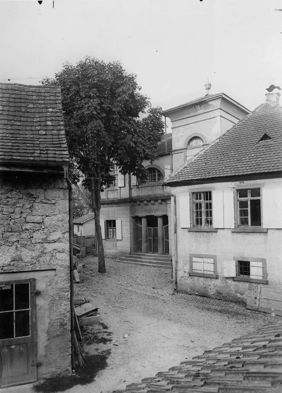 Synagoge Kirchen (Efringen-Kirchen) Nutzungsbedingungen ausdrücklich auch für Wikipedia (siehe: [1]